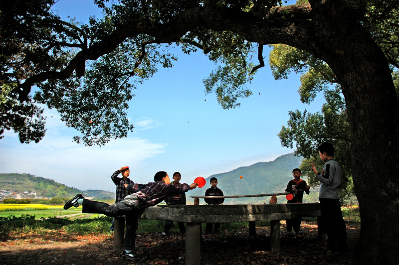 小山村掀起国球热